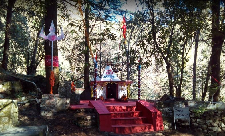 temple pic